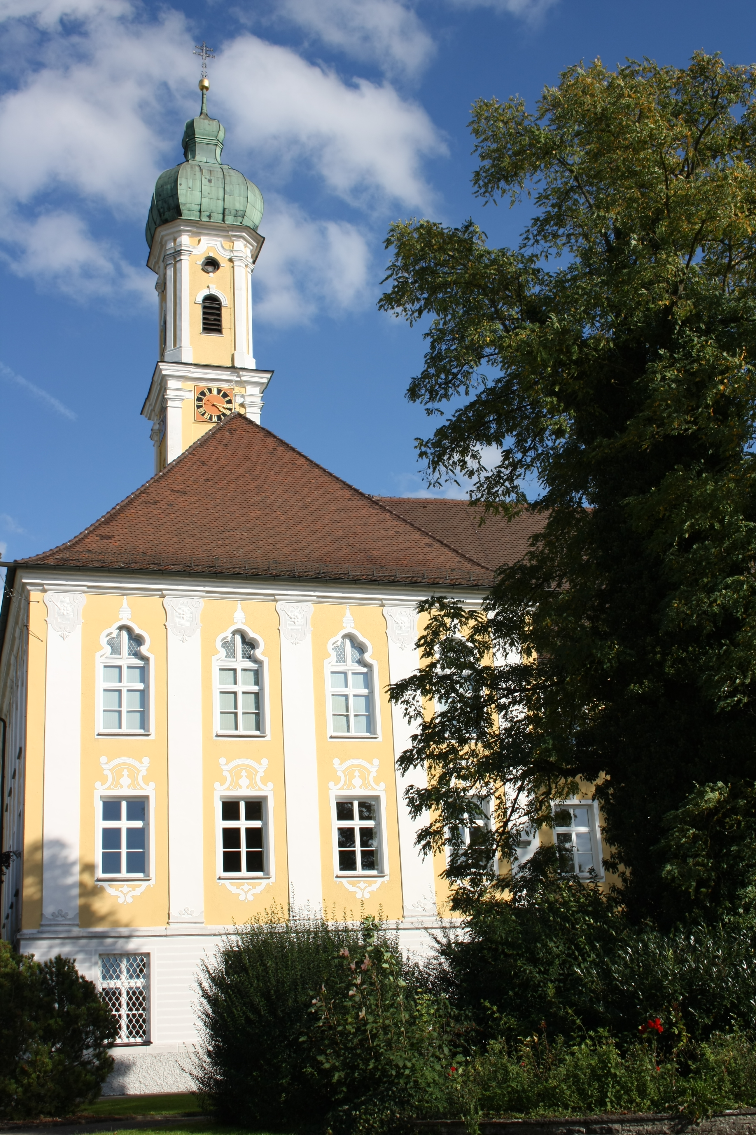 Klosterkirche Maria Medingen in Mödingen (Landkreis Dillingen an der Donau), Dachreiter mit doppelter Zwiebelhaube und Westtrakt (1720–1725) des ehemaligen Dominikanerinnenklosters von Dominikus Zimmermann, Ansicht von Westen